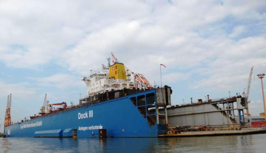 NDL, Dock III